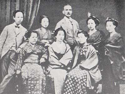 フォンタネージ送別写真 前列右から山下りん、川路花、神中糸子 後列右から秋尾園、大鳥雛、フォンタネージ、山室政子、通訳・竹本五郎